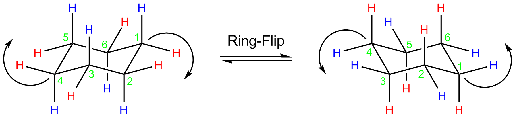 Darstellung des Ring-Flips von Cyclohexan.